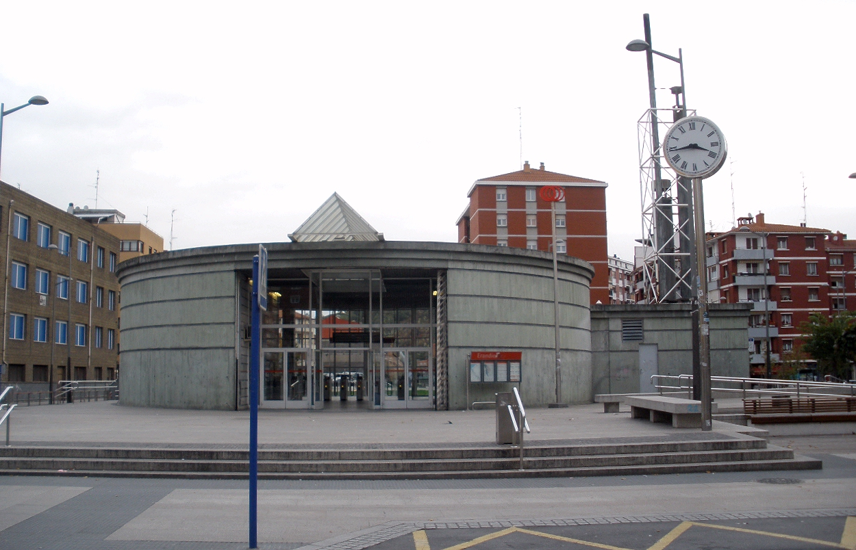 Estación de Metro Bilbao en Erandio (Vizcaya)